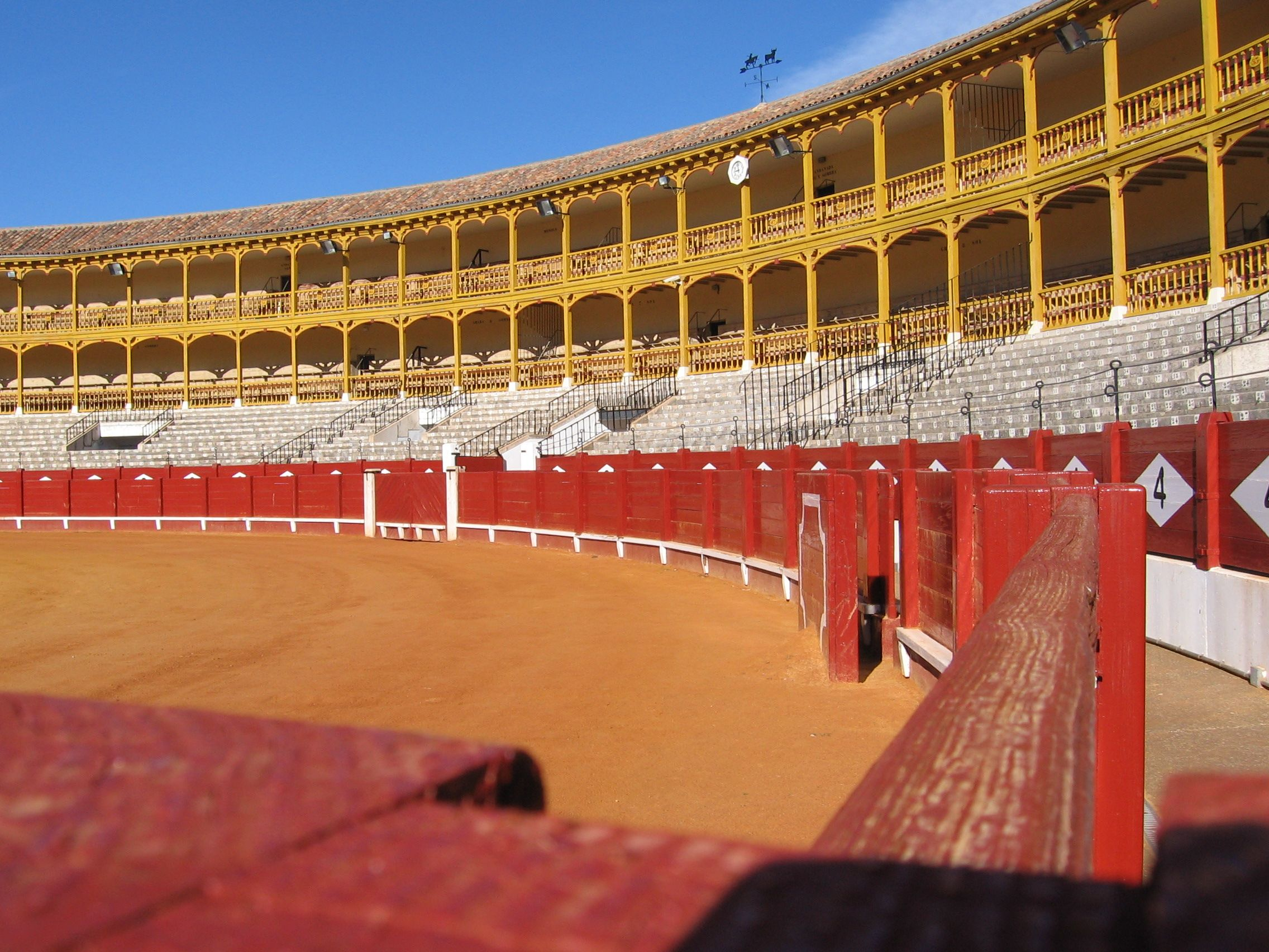 ...desde las tablas - Aranjuez